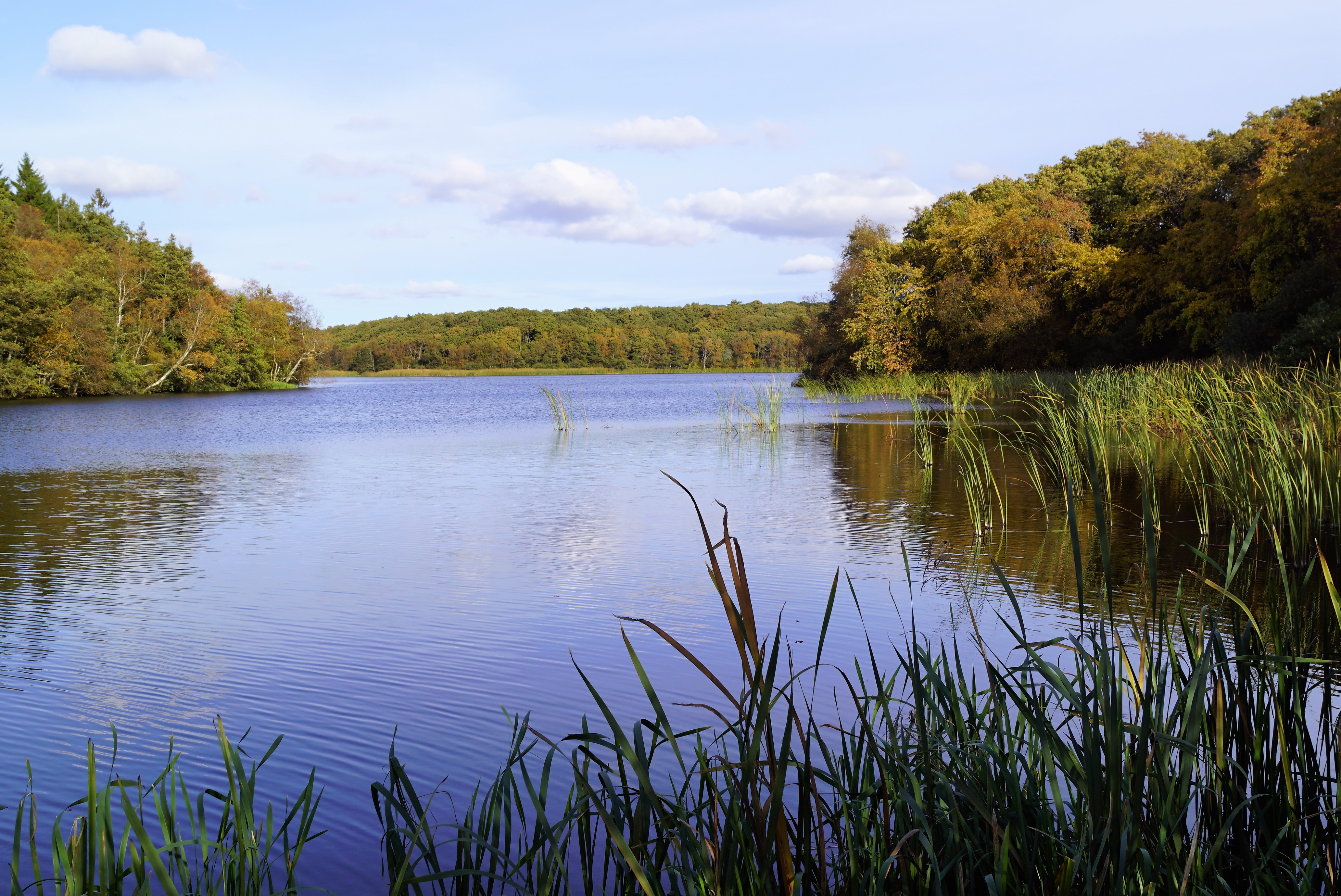 Flyndersø set mod nord fra Snævringen